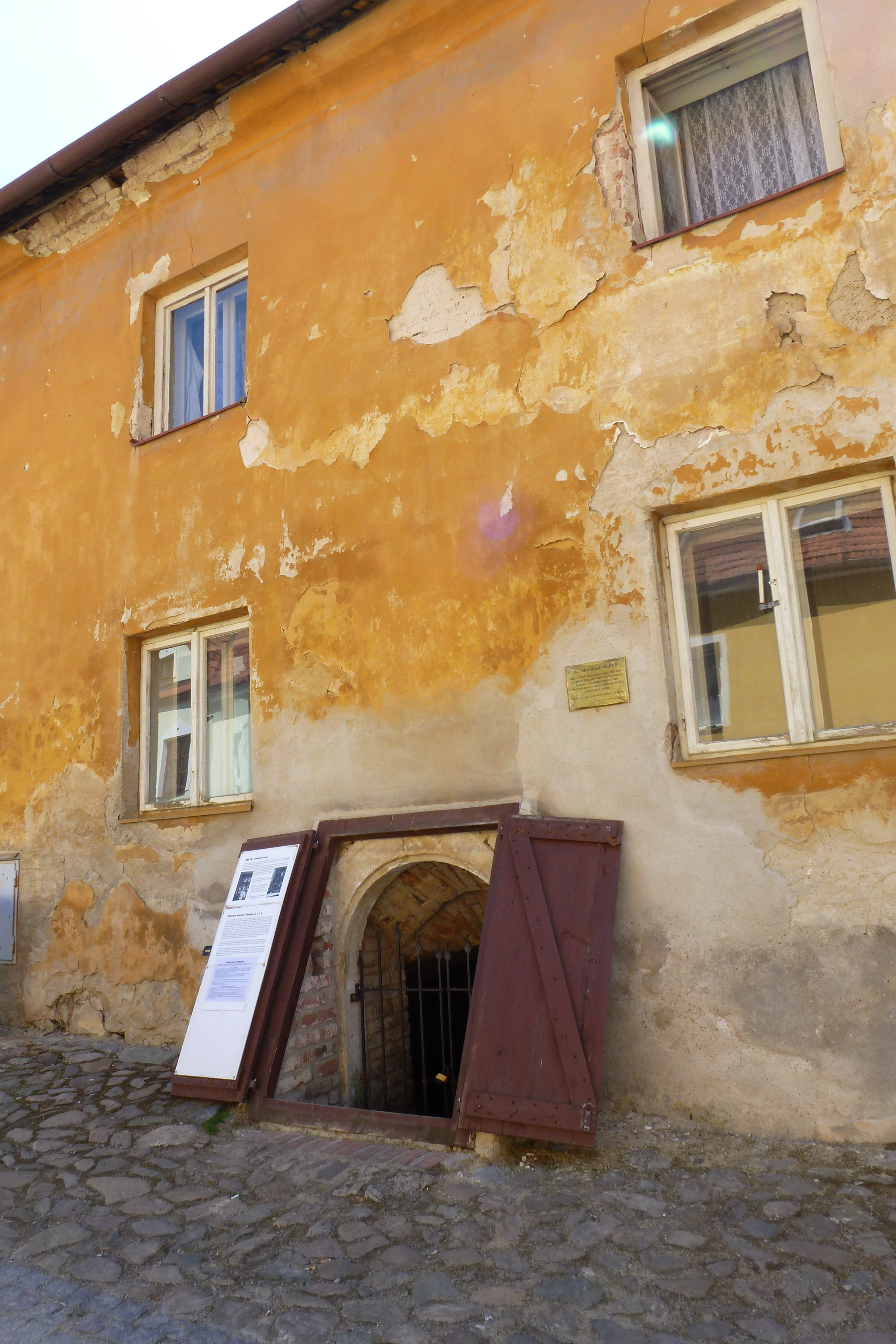 židovská mikve